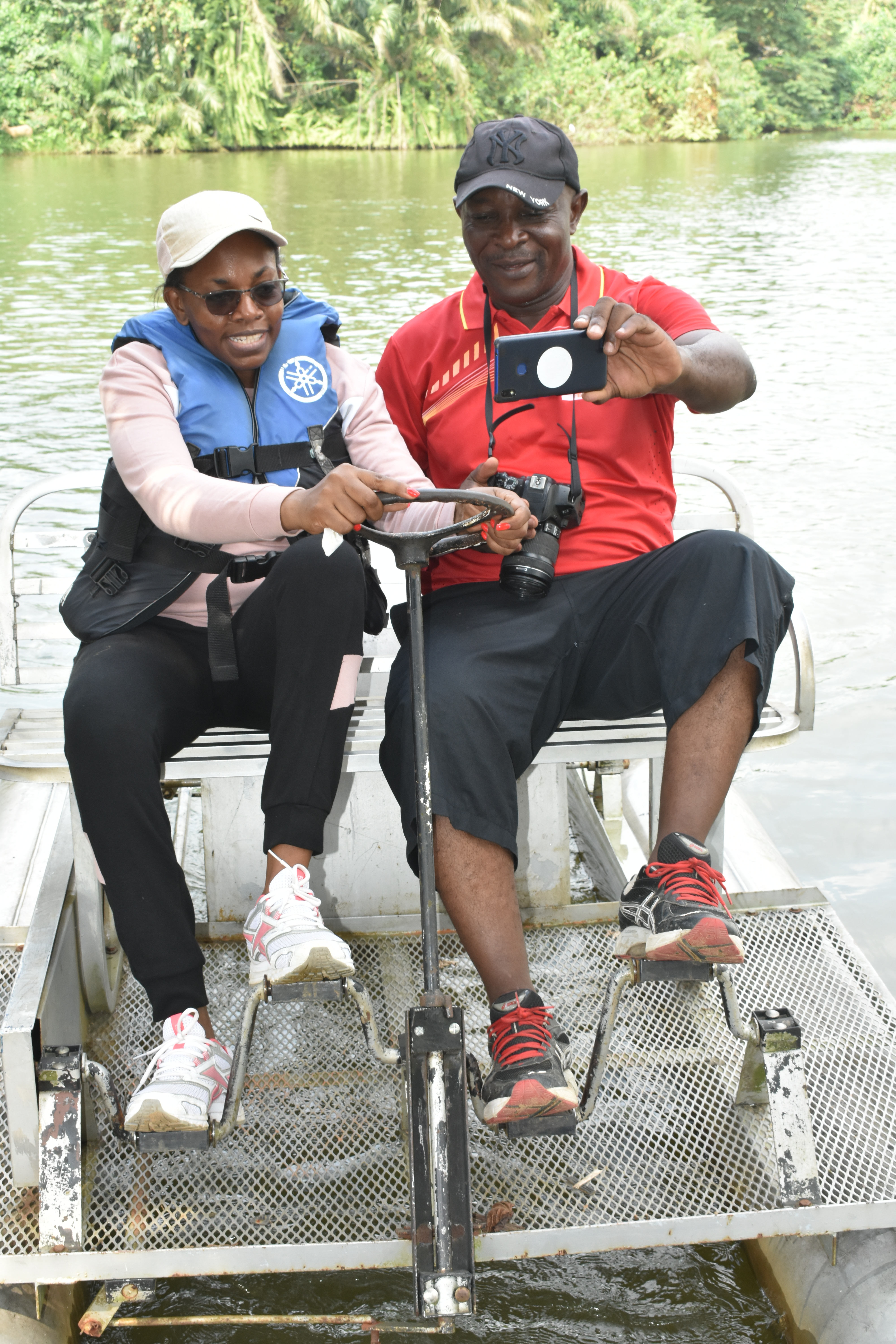 Activités sportives au parcours vita de Douala This is an image with the theme "Africa on the Move or Transport" from: Cameroon